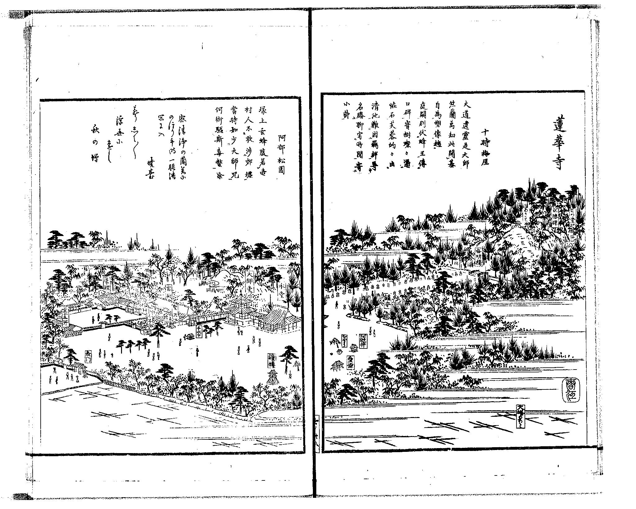 かつての蓮華寺の様子（『尾張名所図会. 巻７ 海東・海西郡』より「蓮華寺」）